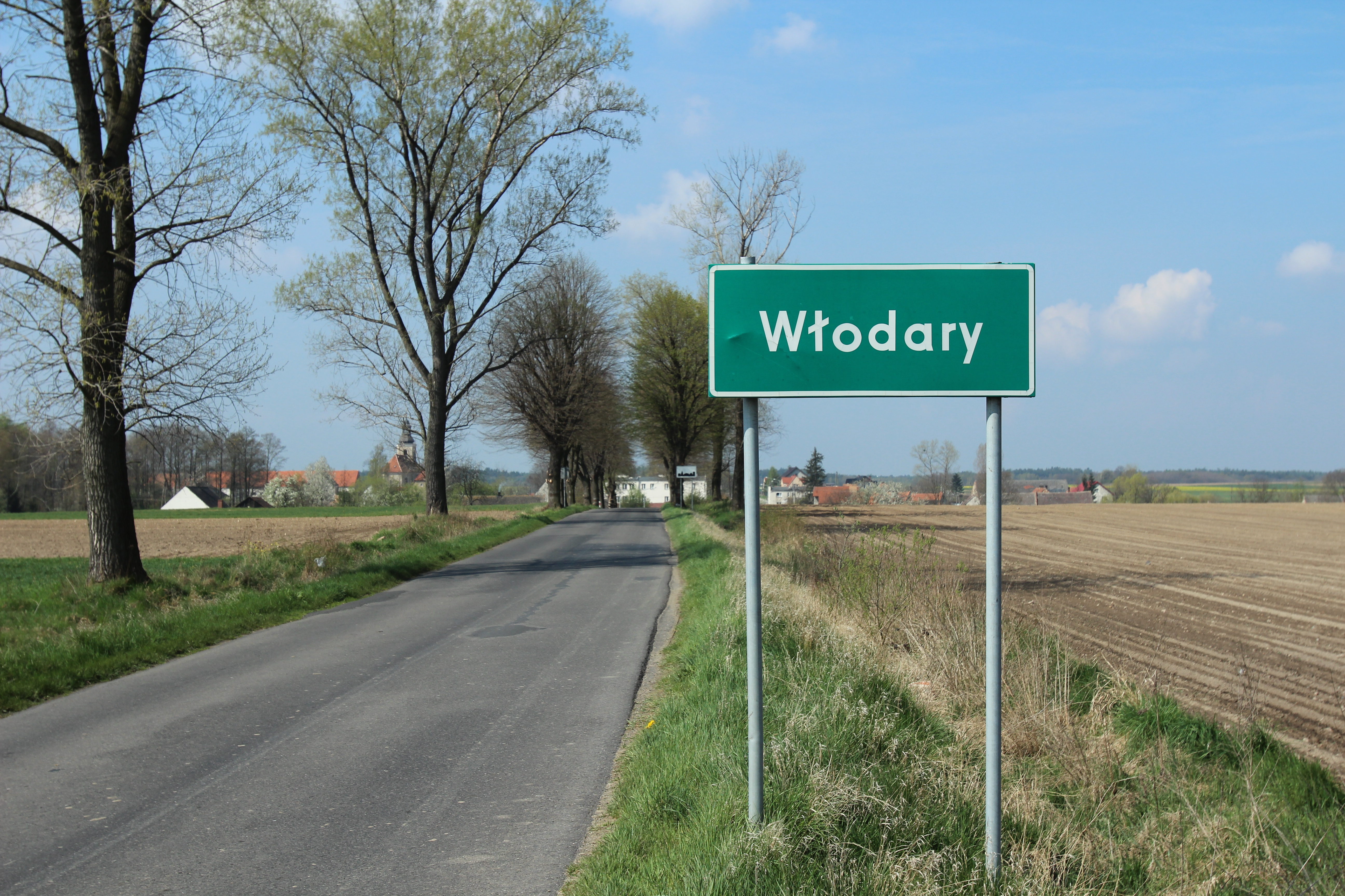 Włodary – wieś w Polsce położona w województwie opolskim, w powiecie nyskim, w gminie Korfantów.